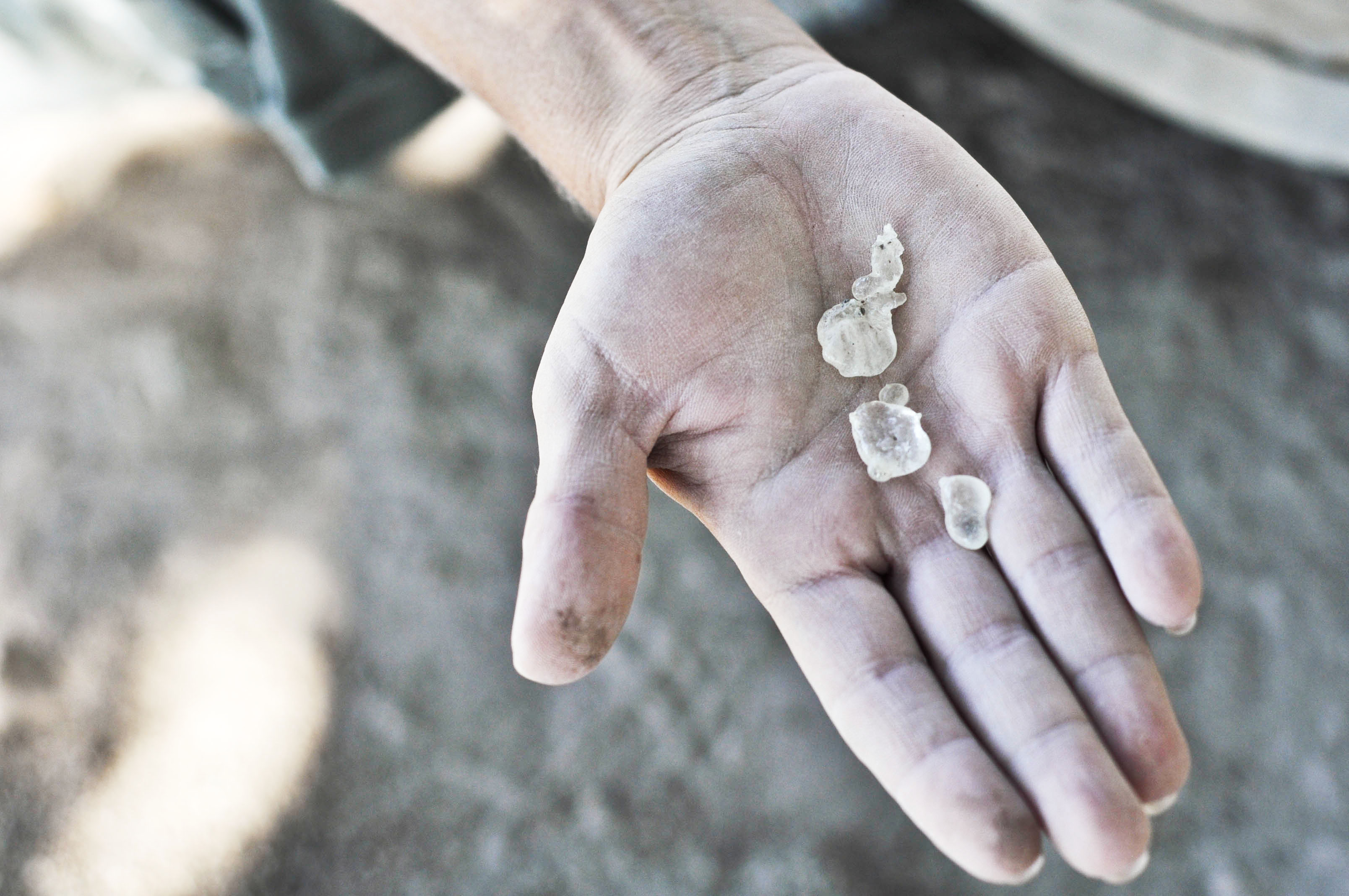 Kryštály mastix, mastiha.